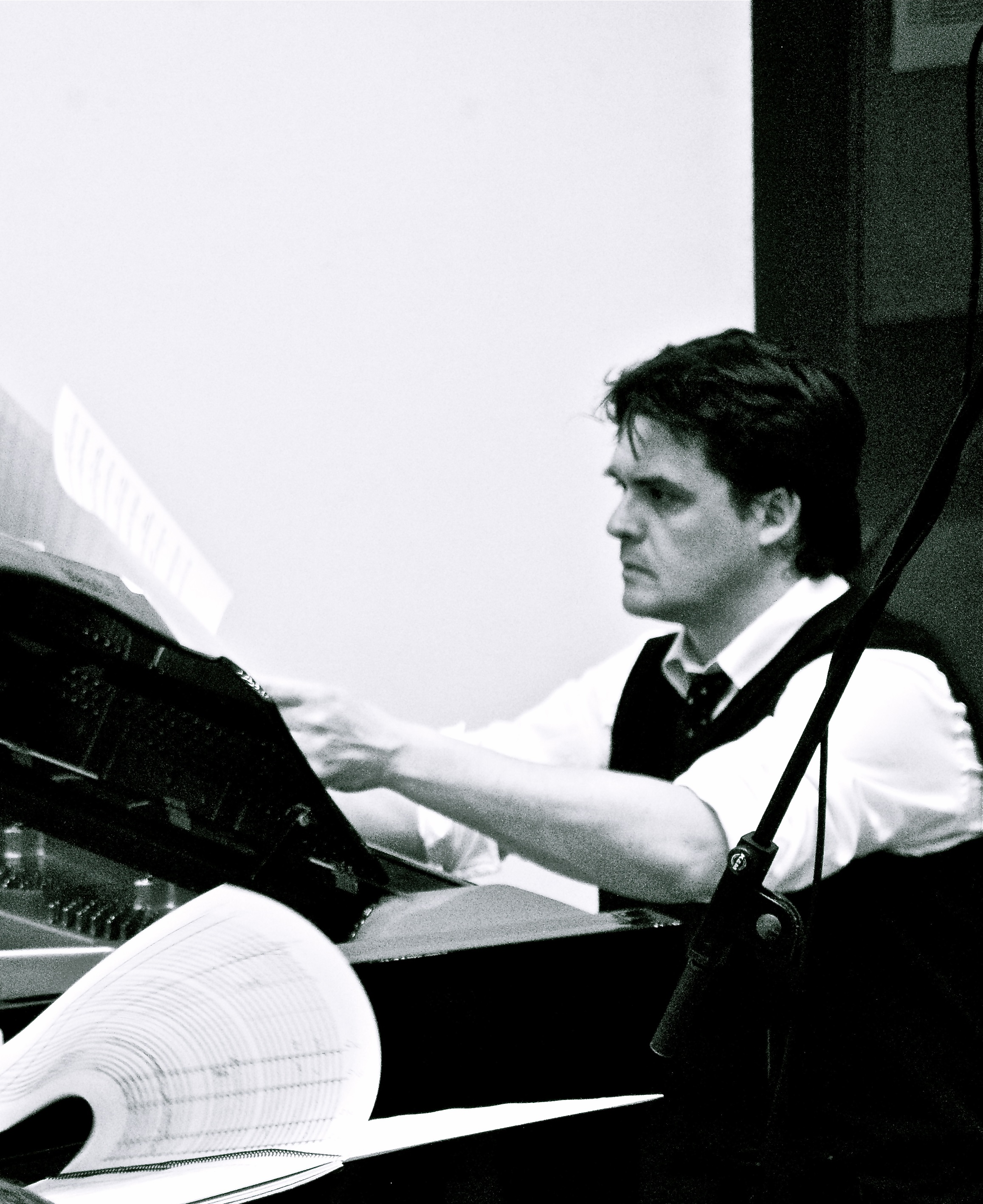 Grabación del CD: Miguel Pons, "Poems in Prose". Concierto para piano y orquesta. Orquesta y coro de la Comunidad de Madrid. Publicado por VERSO Fotografía Iván García